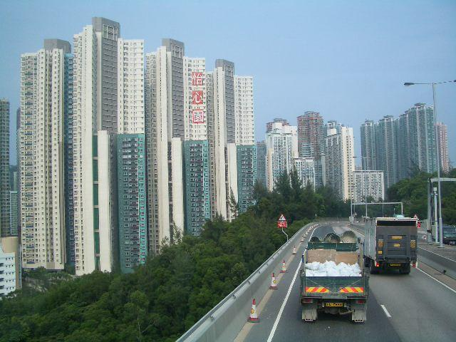 User:Kwan Zheung Laonnie: 將軍澳 Tseung Kwan O, Hong Kong